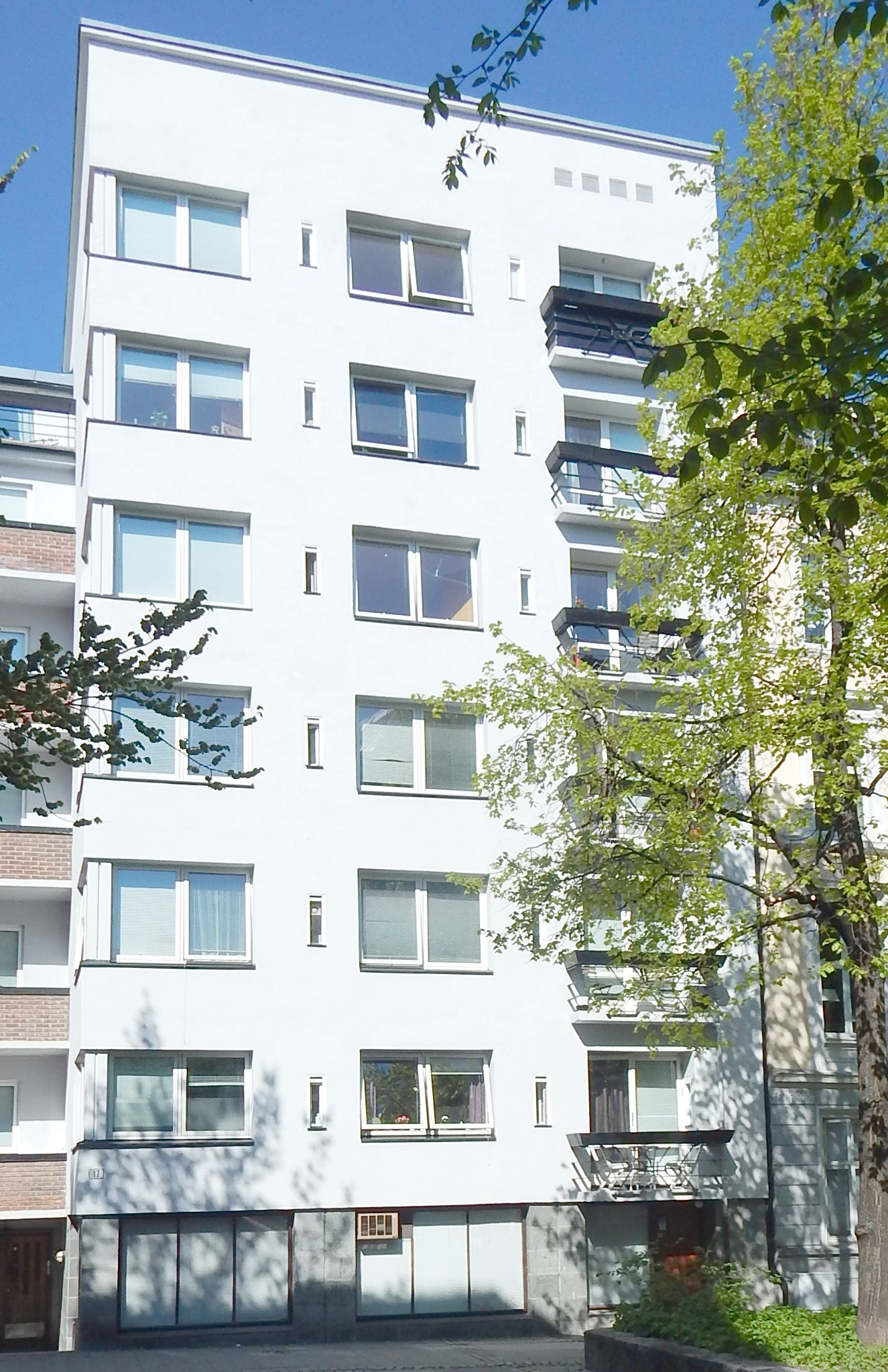 Hegdehaugsveien 17. Arkitekter: Torp & Torp.